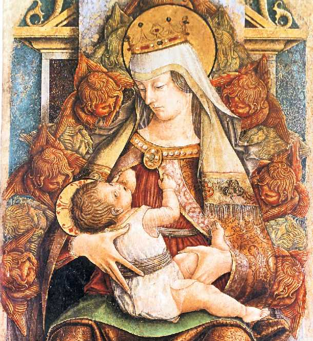 Crivelli, madonna di corridonia 2